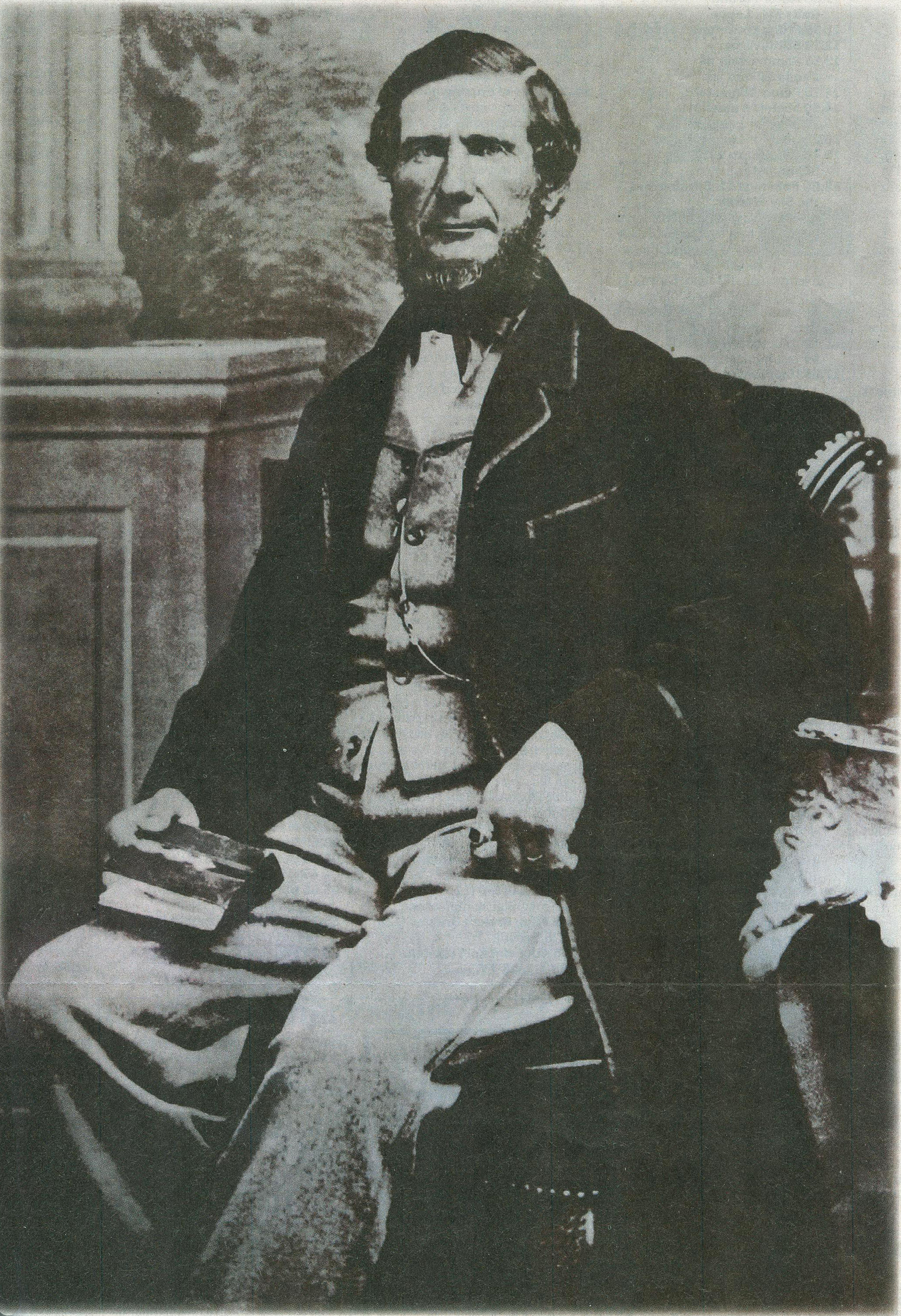 Carl Axel Zetterberg.